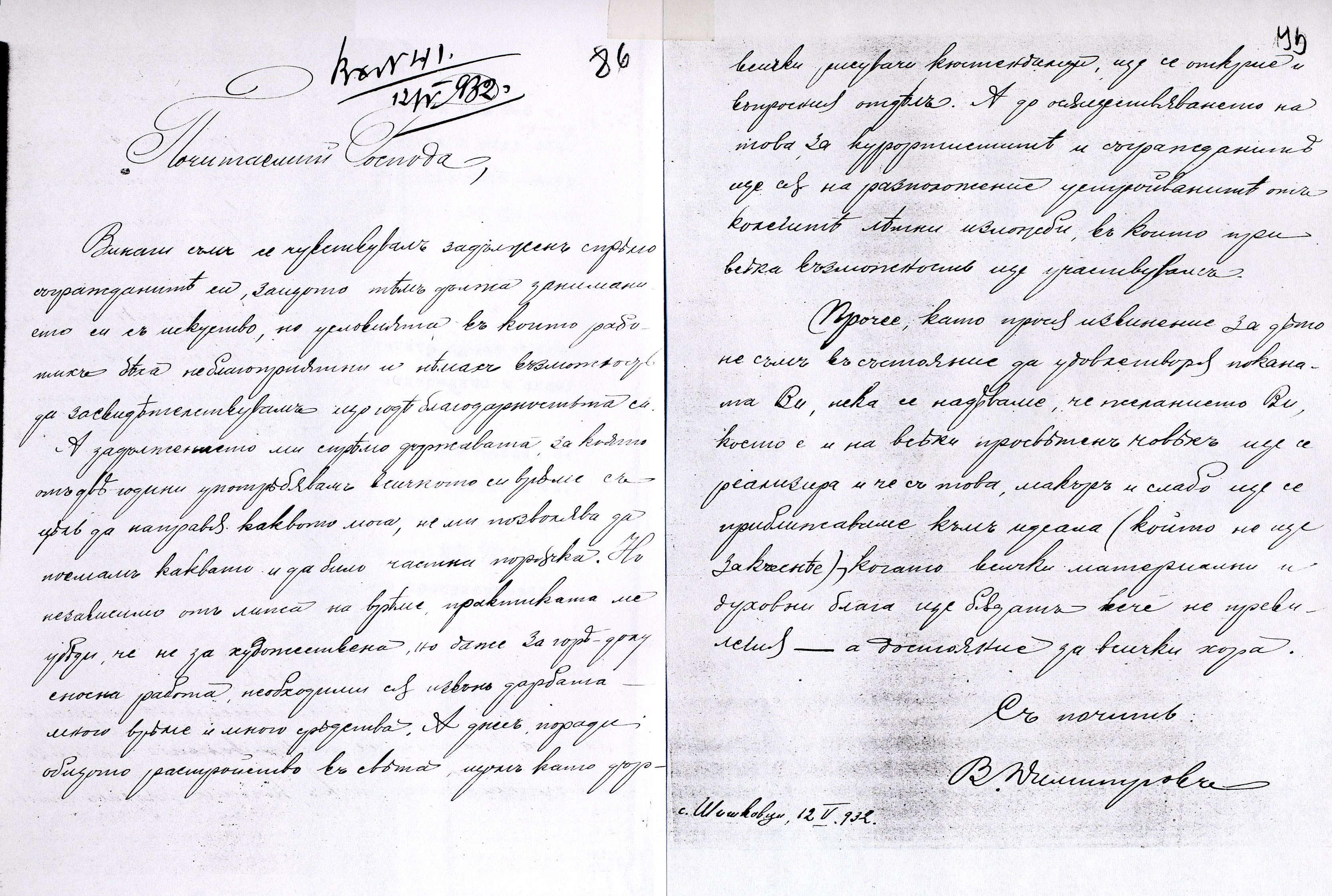 Писмо от Вл.Димитров-Майстора до читалище Братство - Кюстендил